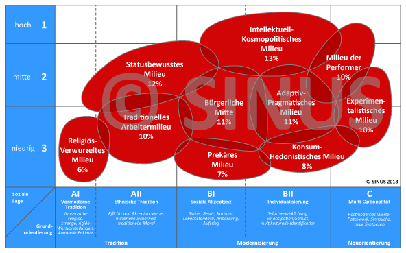 Die Sinus-Migranten-Milieus in Deutschland 2018